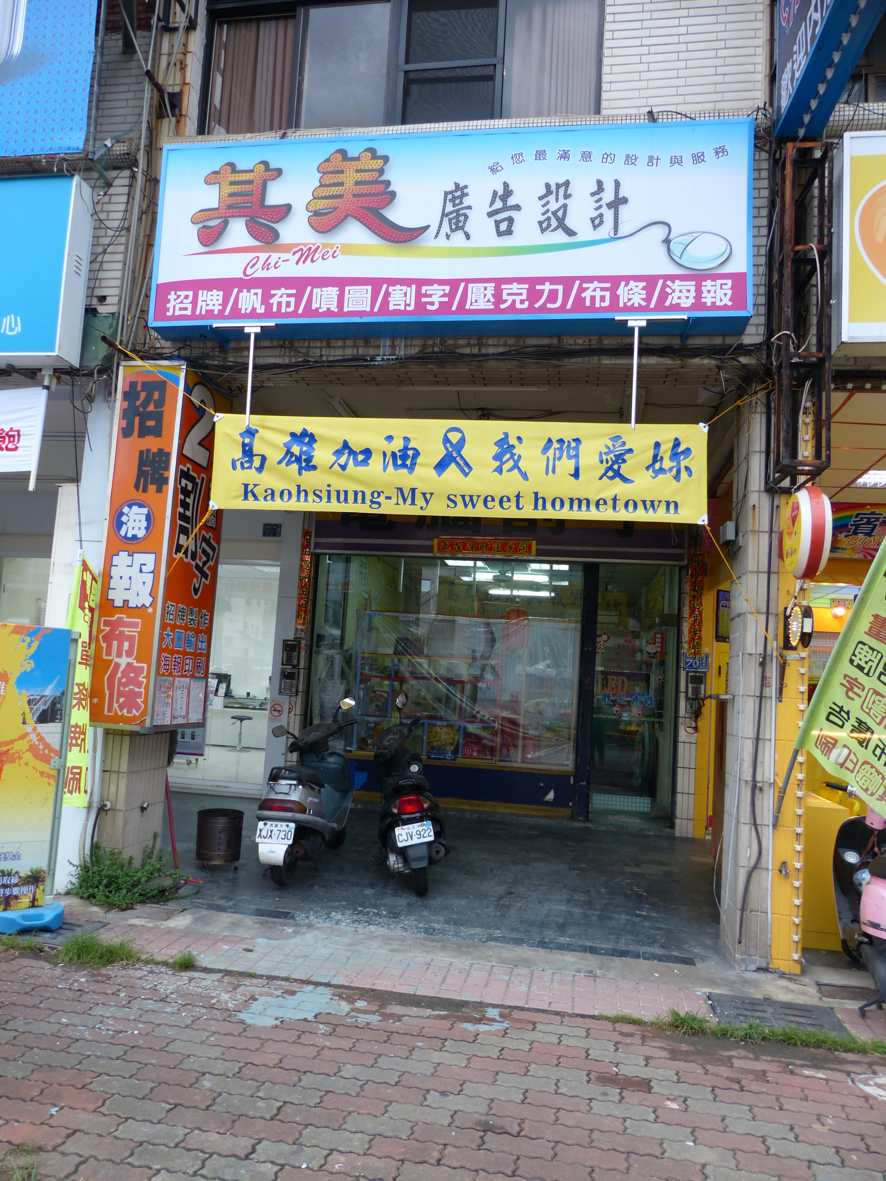 高雄市三多二路其美廣告設計懸掛：「高雄加油，我們愛妳」黃色橫幅，以象黃絲帶。